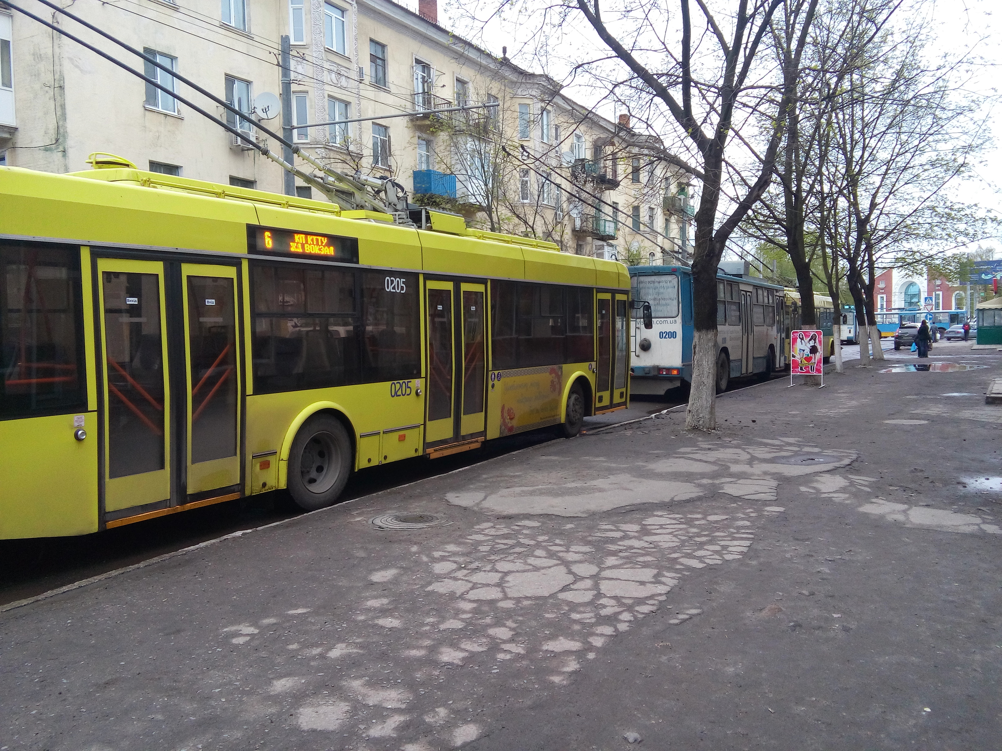 троллейбус